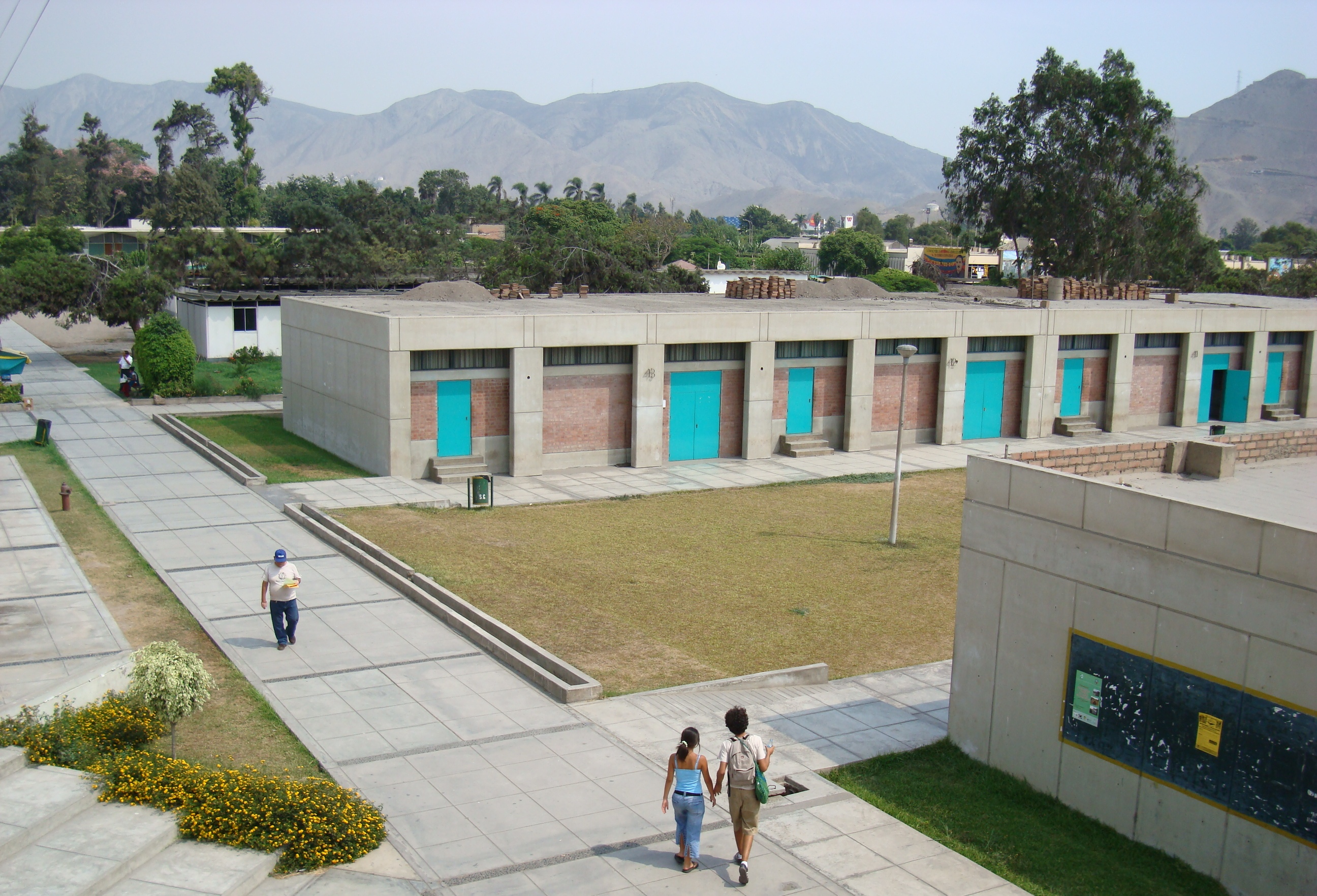 por las aulas turquezas